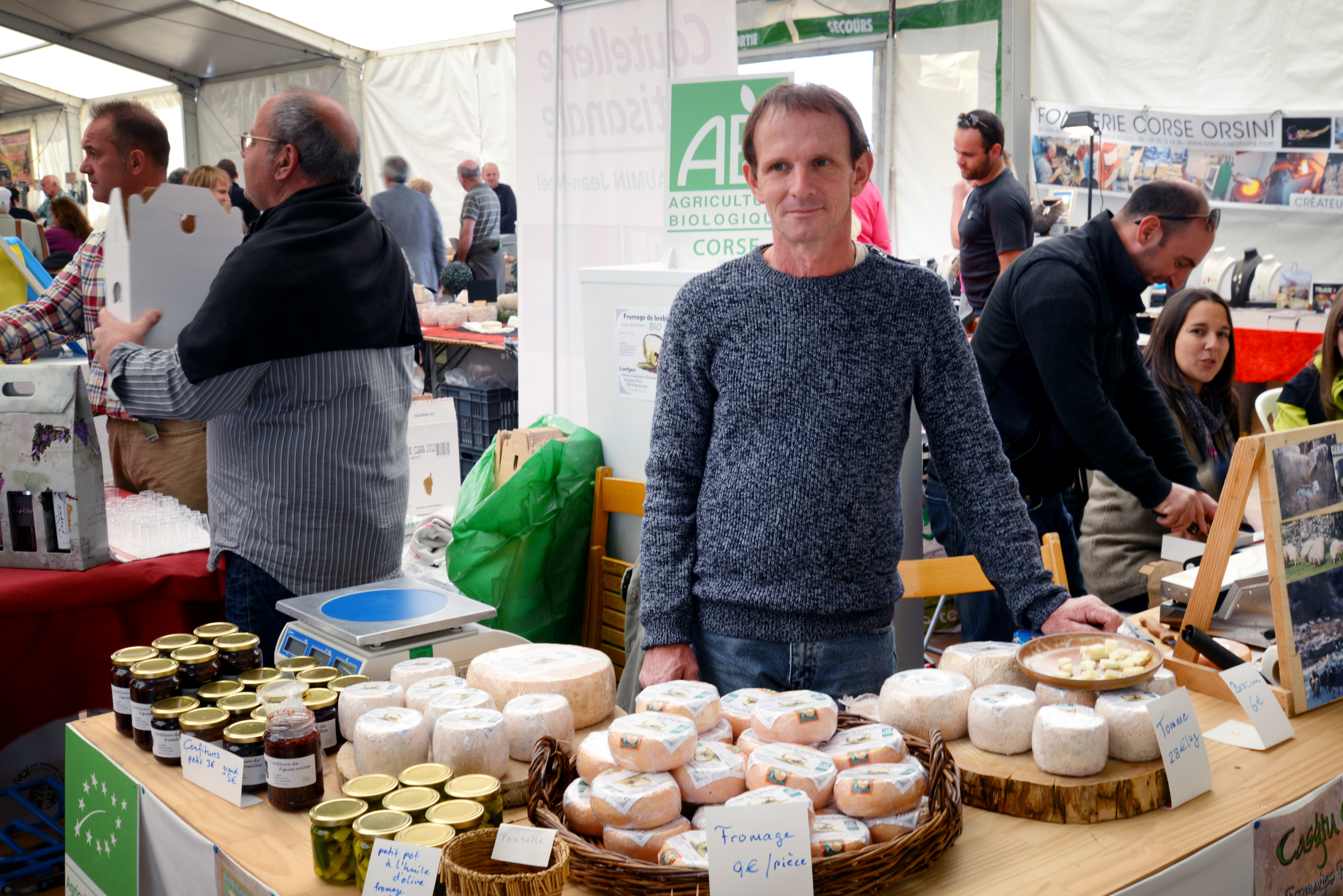 Venaco, Centre Corse - Stand Loefgen, fromages type venachese, à la foire du fromage (Fiera di u Casgiu) édition 2014